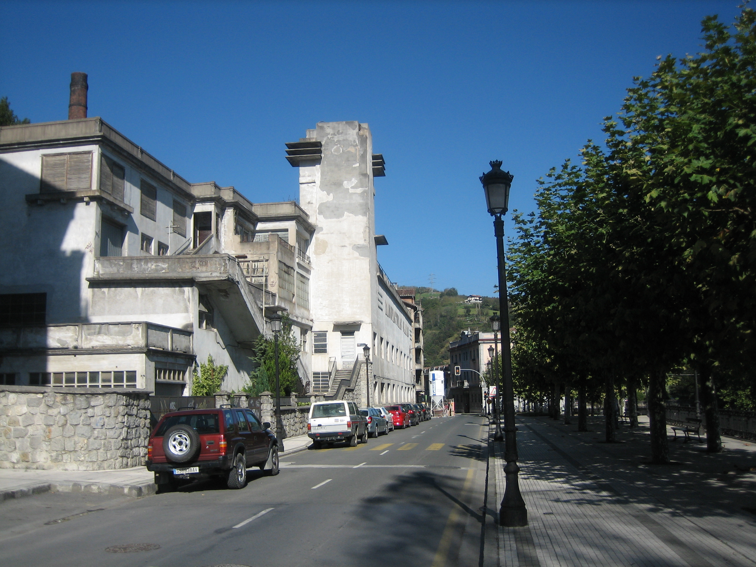 Olaran lantokiko dorrea. Eraikina Beasaindik Ordiziarako bidean aurkitzen da CAFen parean JM Iturriotz kalean. XX. mendearen hasierako arkitektura razionalistaren adibiderik garbiena, espekulazio urbanistikoaren erdian dago une honetan berau eraitsi eta etxebizitzak egiteko asmoa baidu Beasaingo Udalak. Ondare kultural eta arkitektoniko itzela.